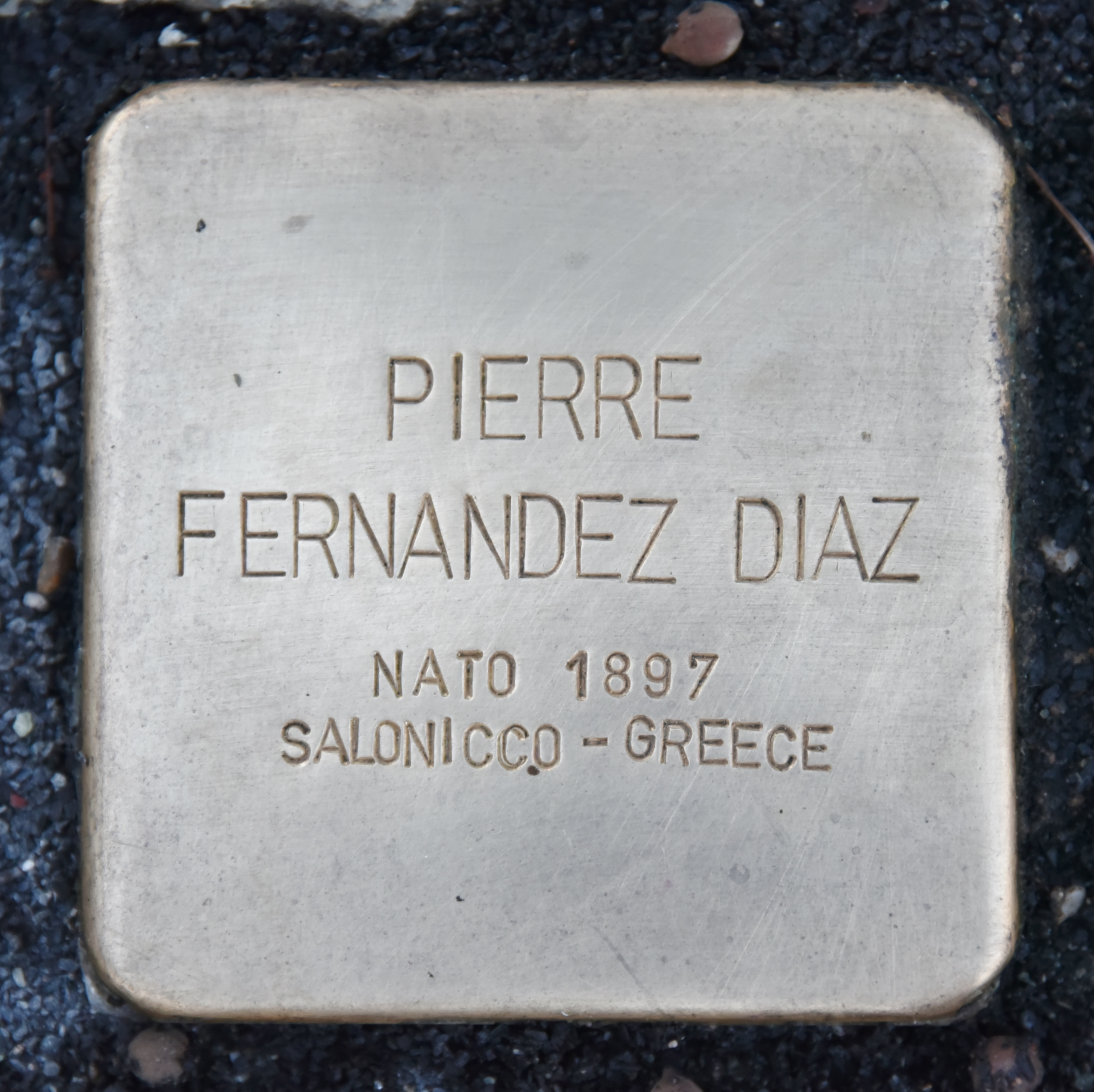 Stolperstein für Pierre Fernandez Diaz